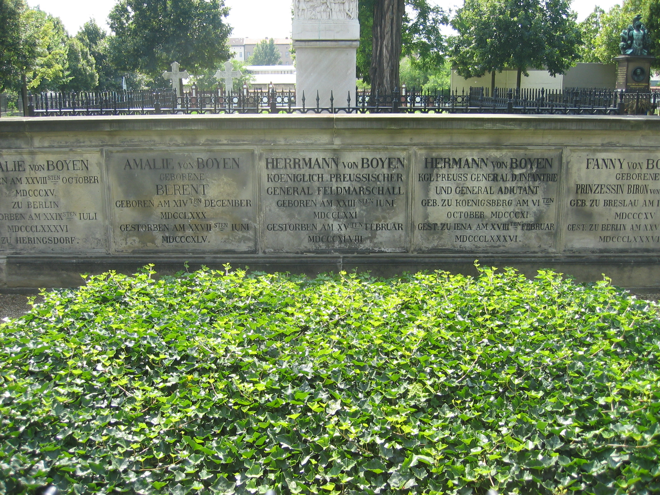 Das Familien Grab von Herrman von Boyen auf dem Invalidenfriedhof in Berlin